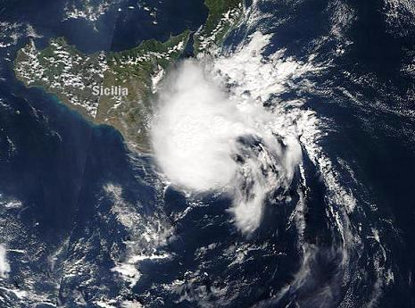 Msg 1 Nasa-Medicane-Mediterranean Tropical Cyclone del Dicembre 2005 a sud di Creta Modis NASA This file is in the public domain because it was created by NASA. NASA copyright policy states that "NASA material is not protected by copyright unless noted". (NASA copyright policy page or JPL Image Use Policy).